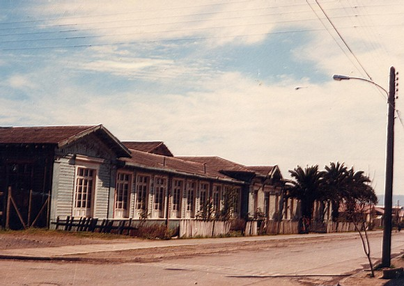 Frontis del Liceo de Hombres de Lebu. El Liceo Isidora Ramos de Gajardo es el único plantel educativo científico-humanista que posee la comuna de Lebu, Región del Bío-Bío, Chile.